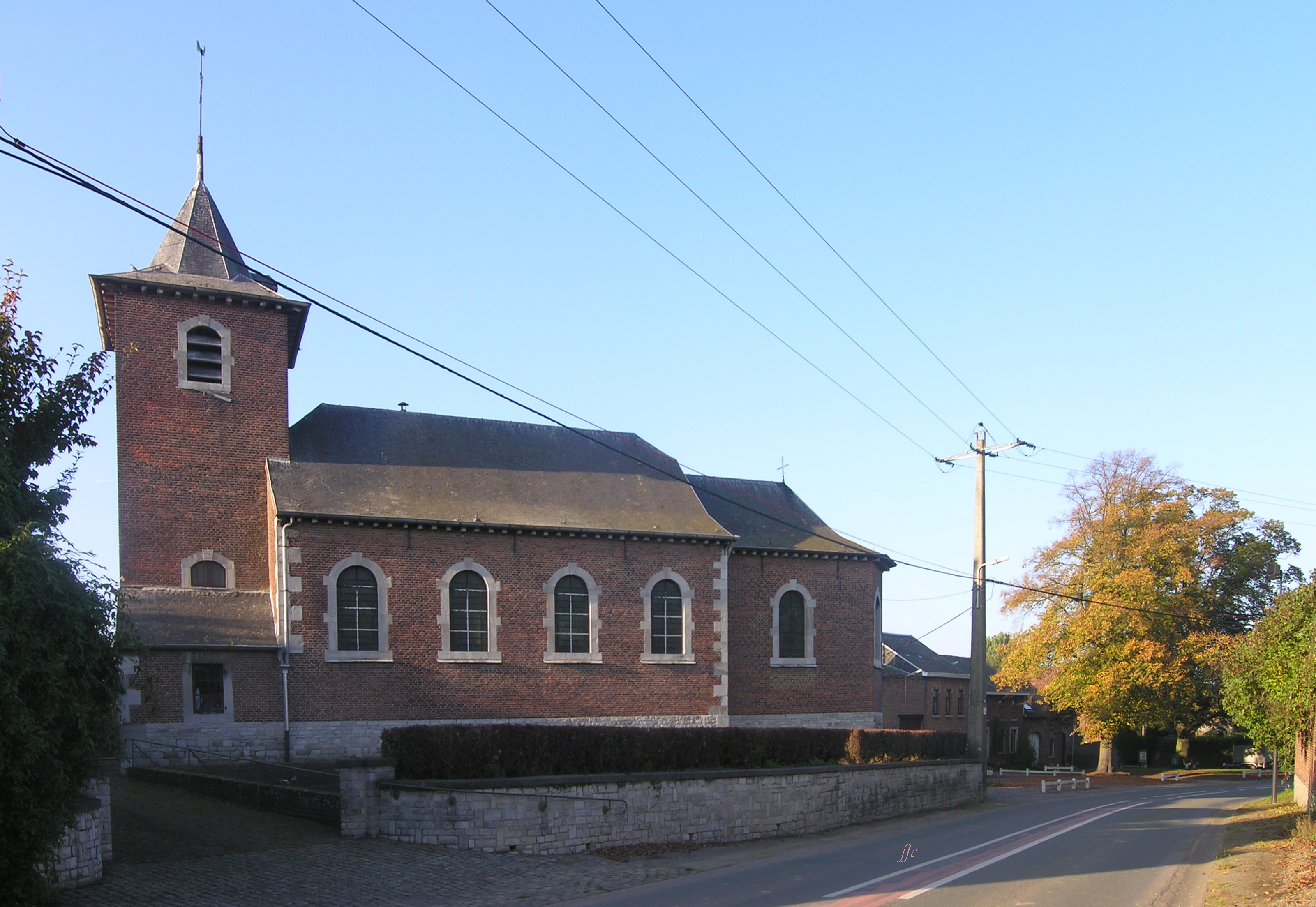 Church Lens-Saint-Servais